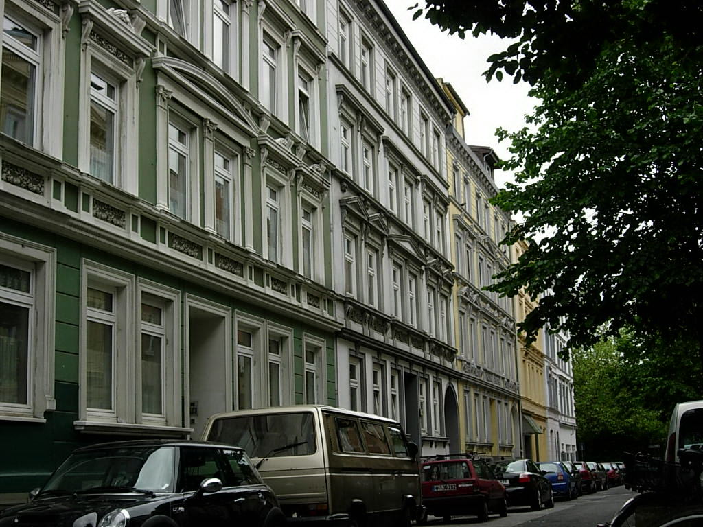 Ostteil der Esmarchstraße in Altona-Altstadt. Das Gebiet wurde früher auch Abbruzenviertel genannt.